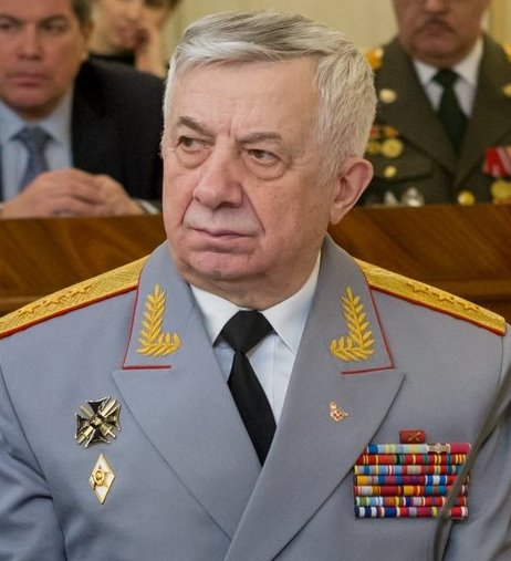 Шевцов Леонтий Павлович (род.1946) — российский военачальник, генерал-полковник